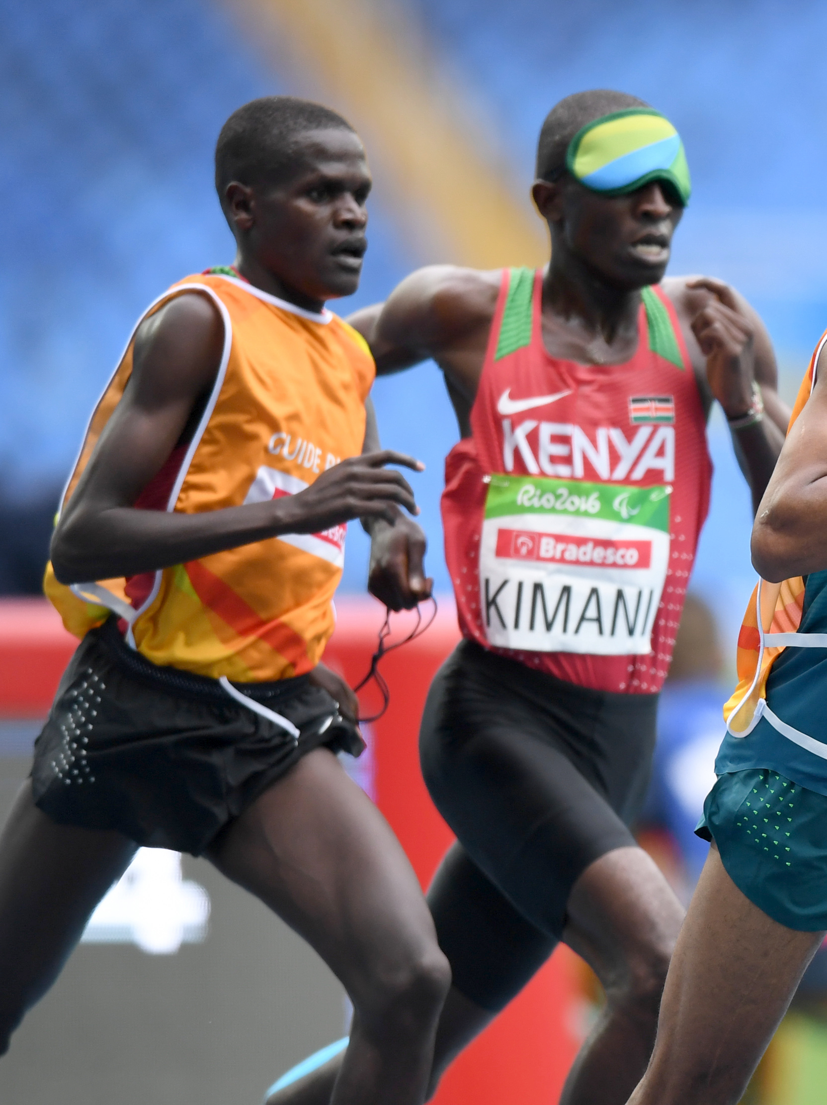 Rio de Janeiro - O brasileiro Odair Santos, 35 anos, conquistou a primeira medalha brasileira nos Jogos Paralímpicos Rio 2016. Ele ficou em segundo lugar nos 5000 metros rasos (Tânia Rêgo/Agência Brasil)